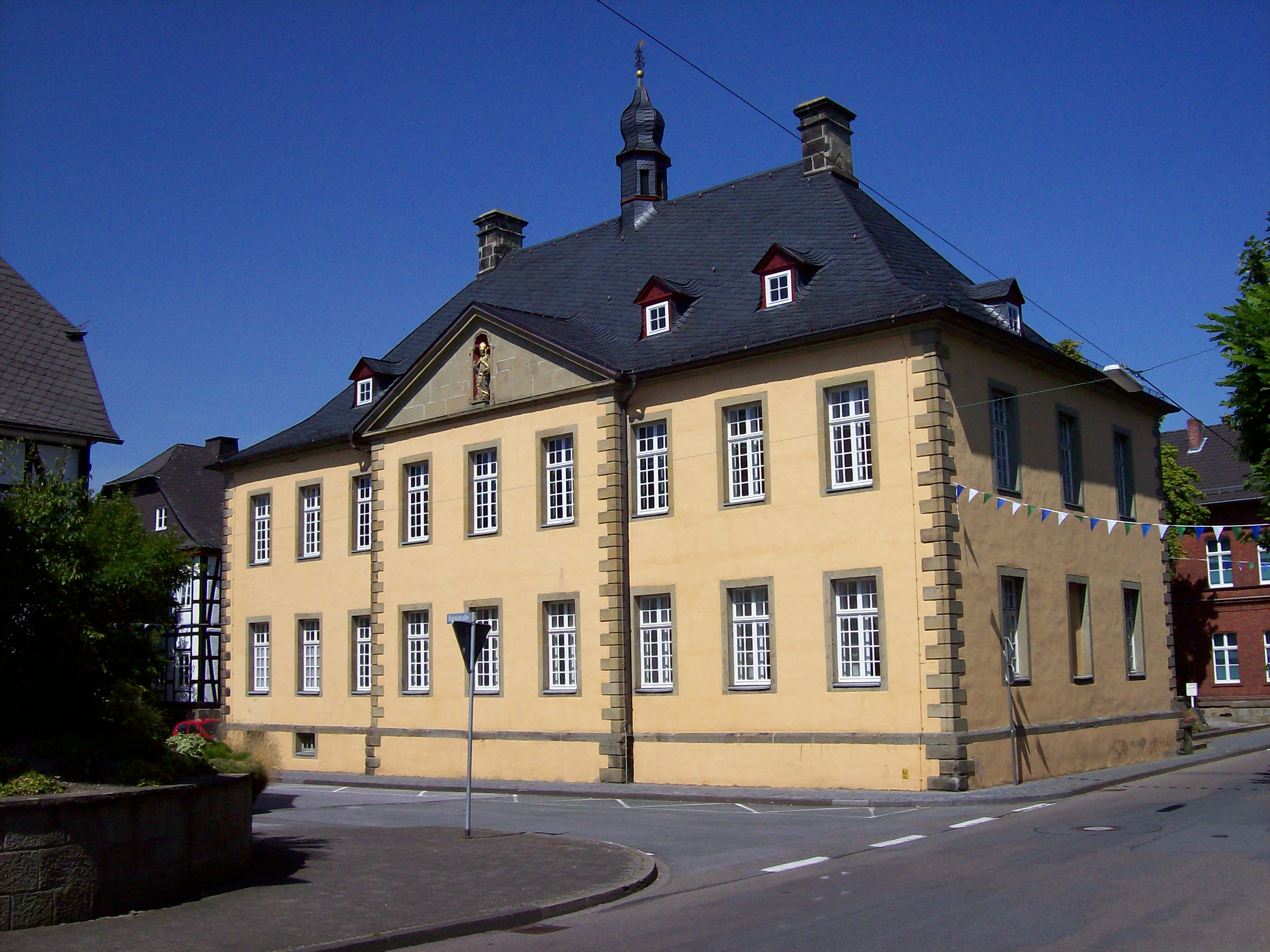 Altes Rathaus in Rüthen, Rückeite (Germany)